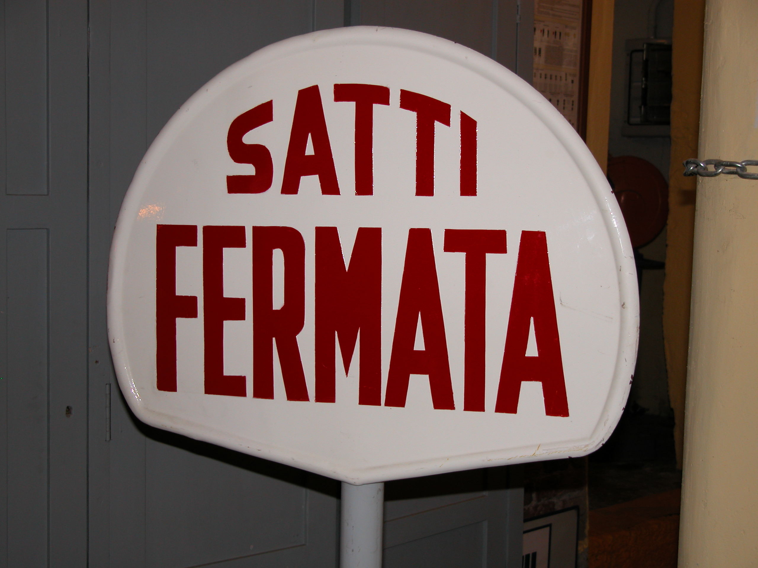 Palina delle fermate delle linee automobilistiche SATTI conservata nel museo GTT di Torino P.M.